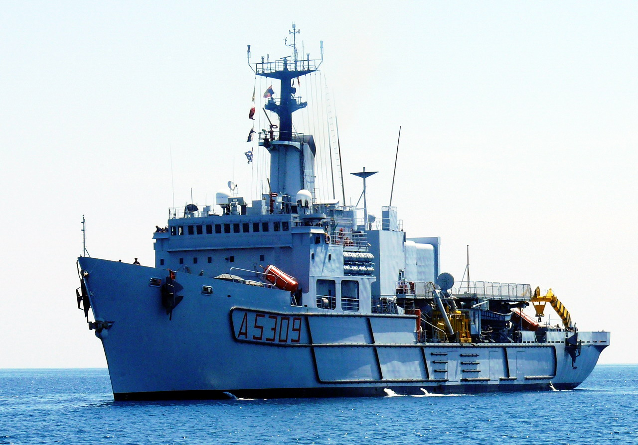 Nave salvataggio Anteo a Cartagena